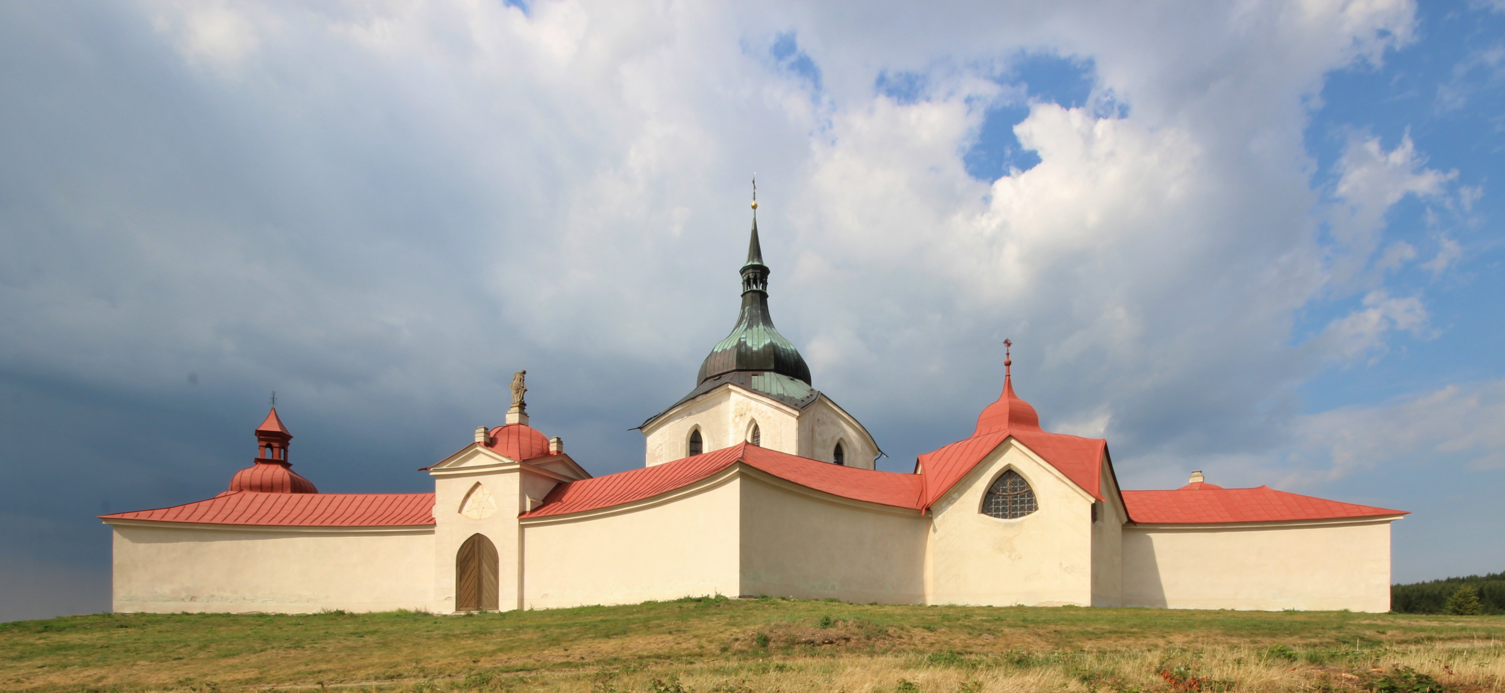 Poutní kostel sv. Jana Nepomuckého na Zelené hoře.